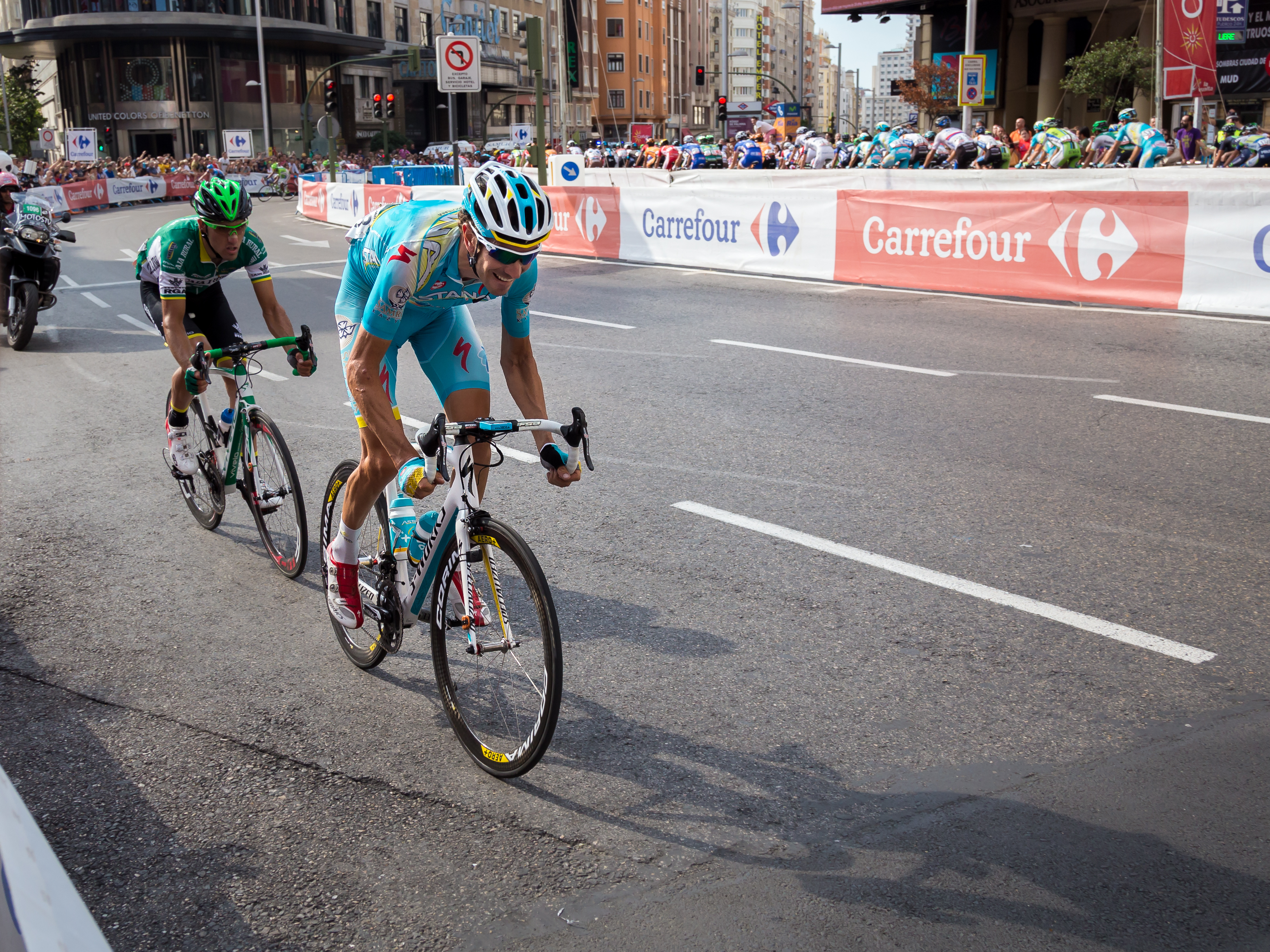 Alessandro Vanotti (#38/Astana Pro Team). Última etapa de la Vuelta a España 2013. Madrid.